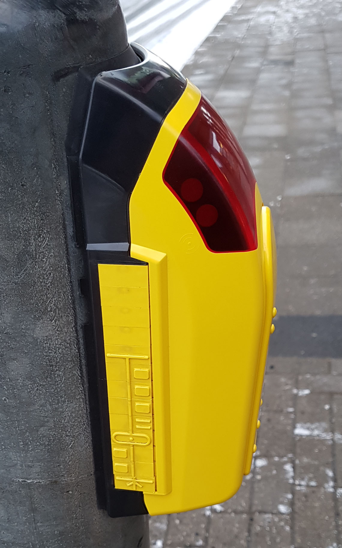 Reliefsymbol an deinem Anforderungskontakt einer Ampel. Der Übergang wird Symbolisch dargestellt, sodass Sehbehinderte sich einen Überblick über den Übergang verschaffen können.